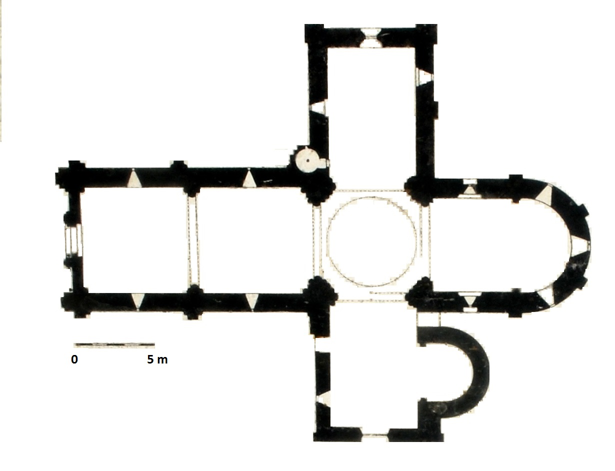 Corme-Ecluse église Plan